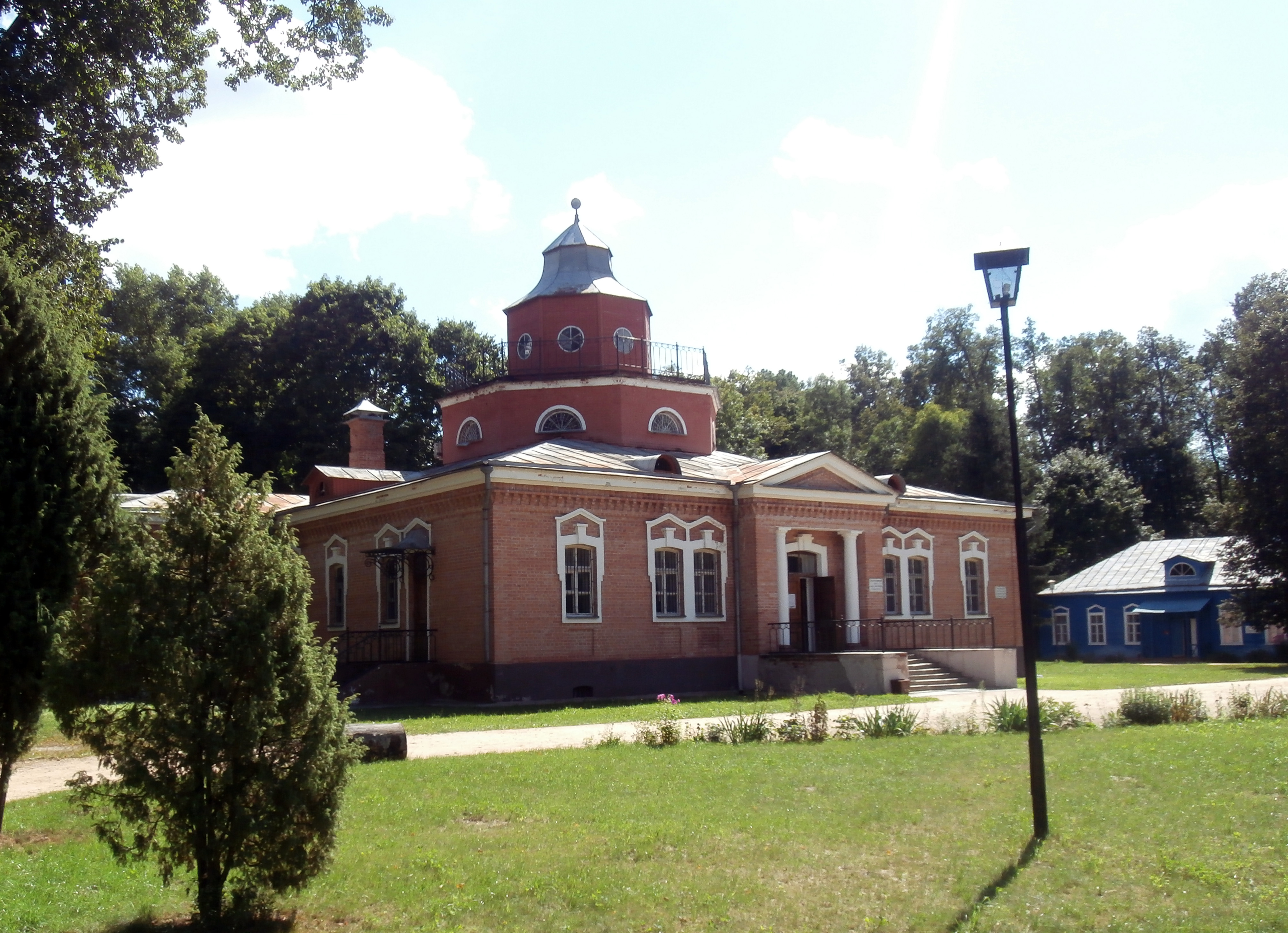 Дом Алексея Константиновича Толстого. На заднем плане флигель писателя.